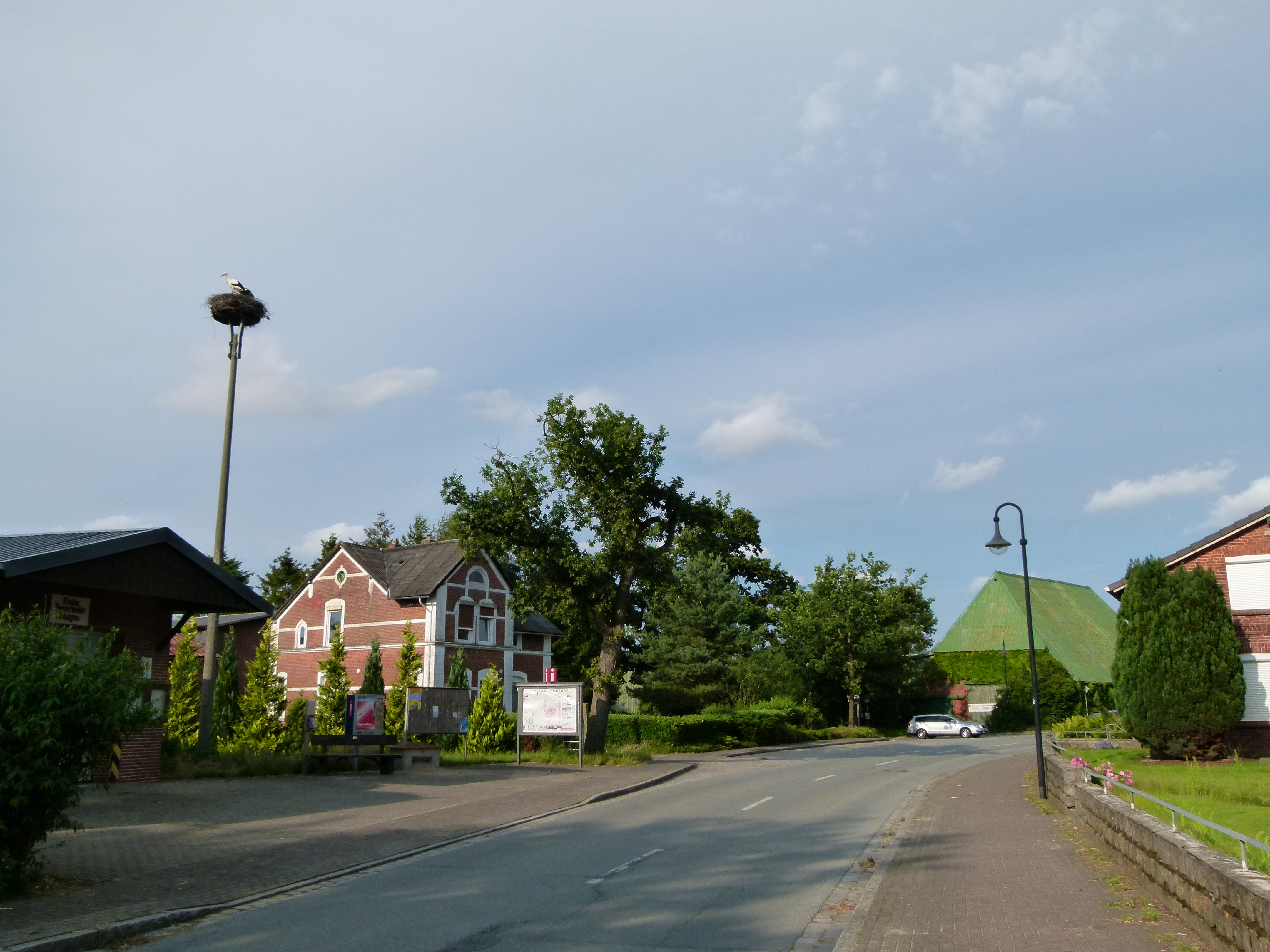 Dorfstrasse, Dätgen